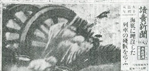 関東大震災によって根府川駅から海底に転落した列車の車輪。1975年10月13日夕刊に転載されている。